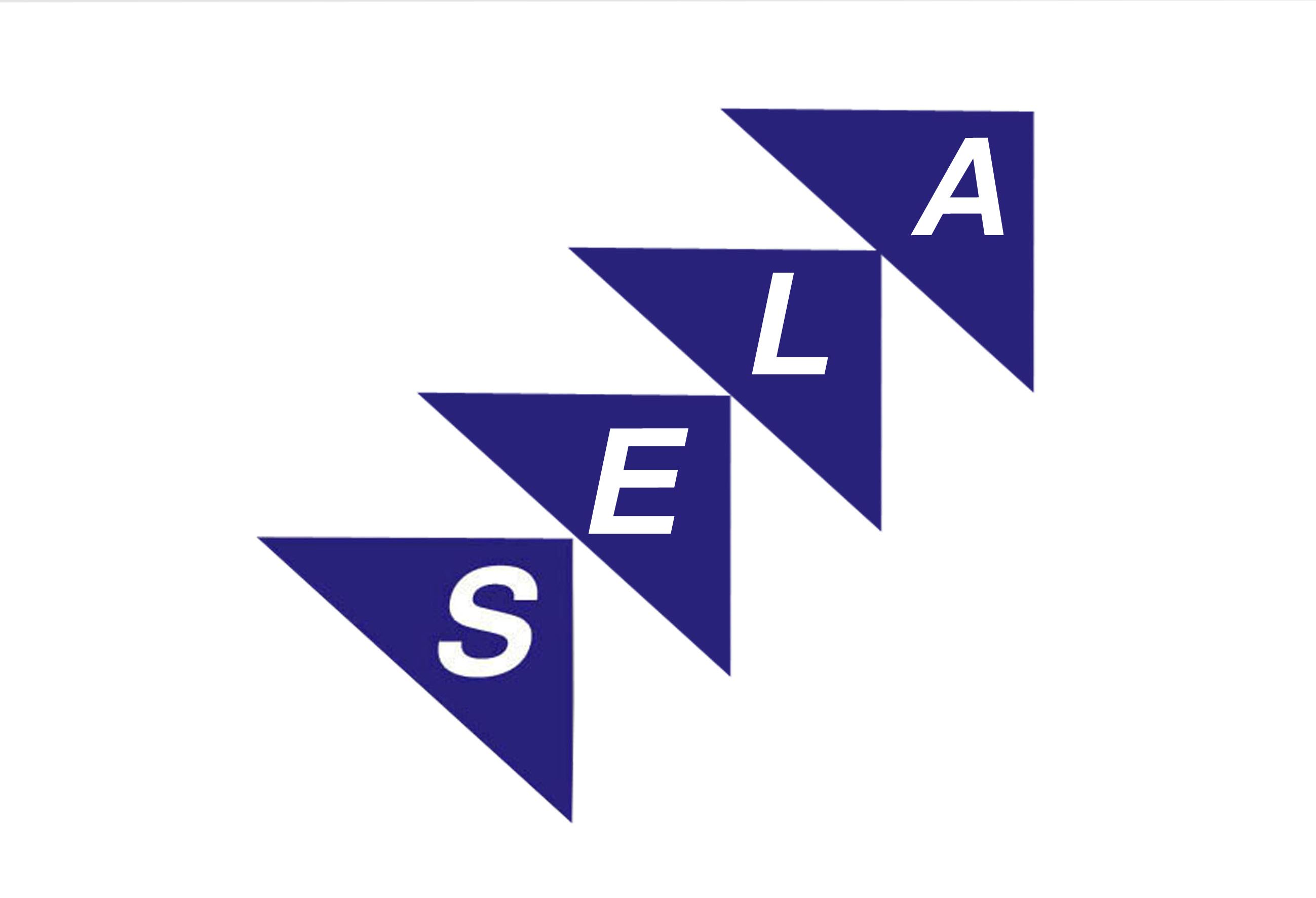 Bandera del SELA